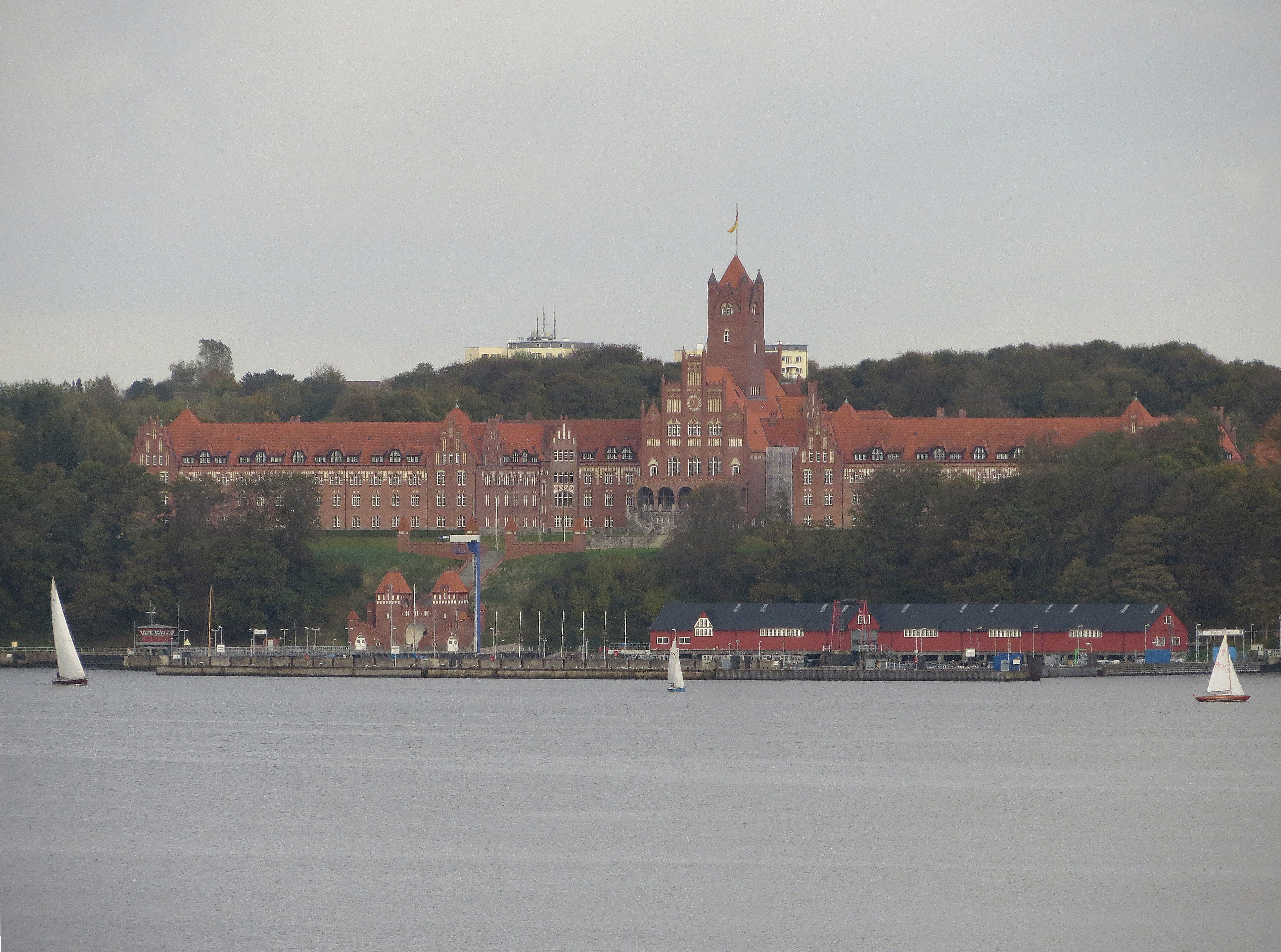 Das Rote Schloss Mürwik bei schlechtem Wetter (2012), Bild 01